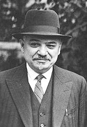 Посол СССР в Великобритании Майский И.М., Лондон, 1941 г.